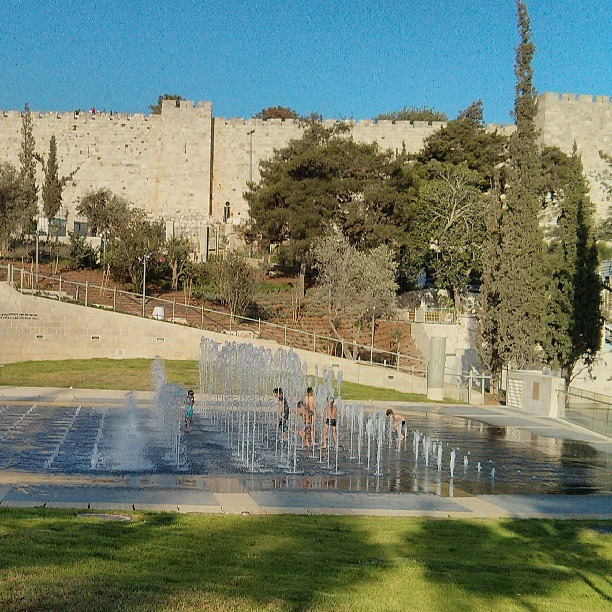 מזרקה בפארק טדי, ירושלים